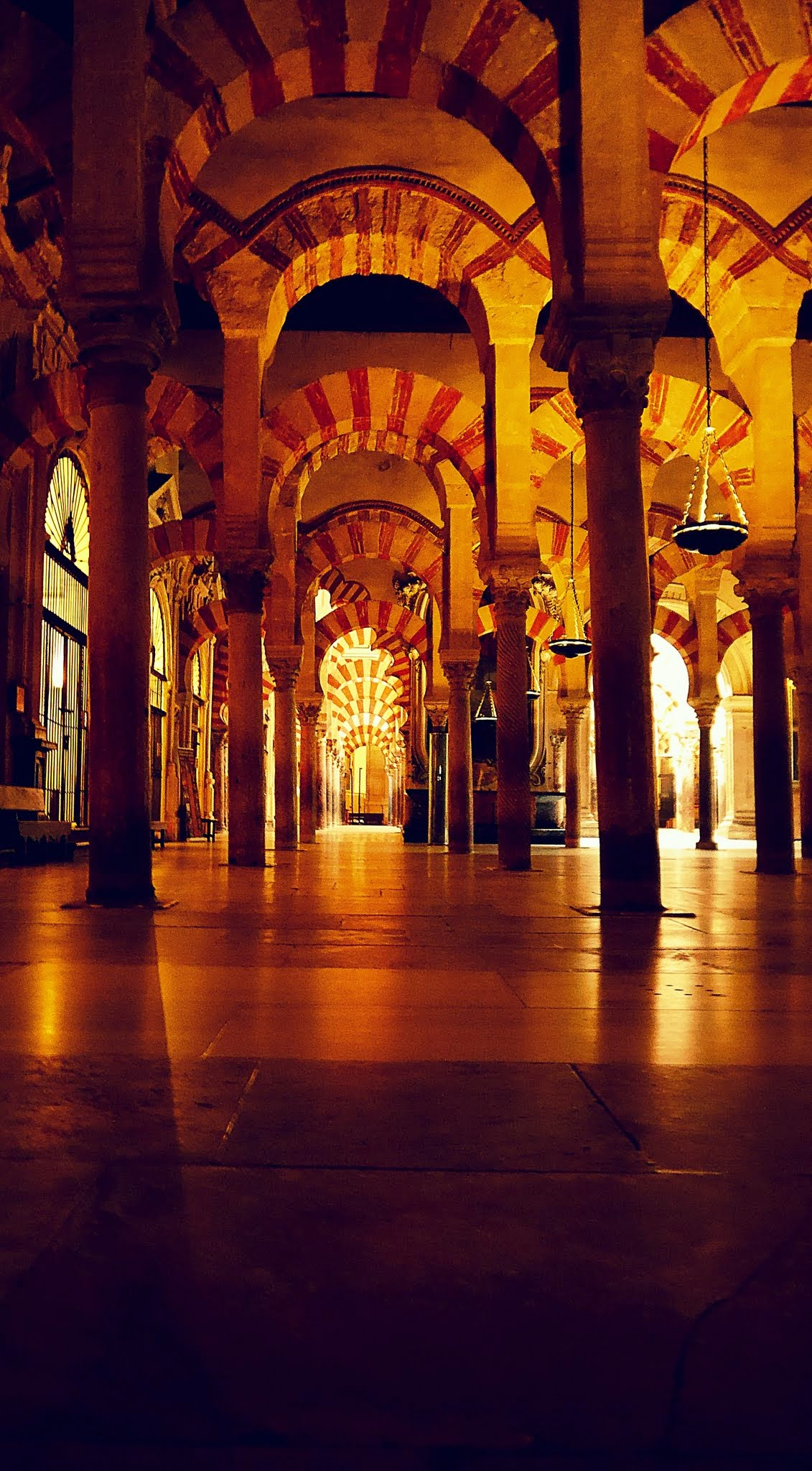 Moschee mit Rundbögen